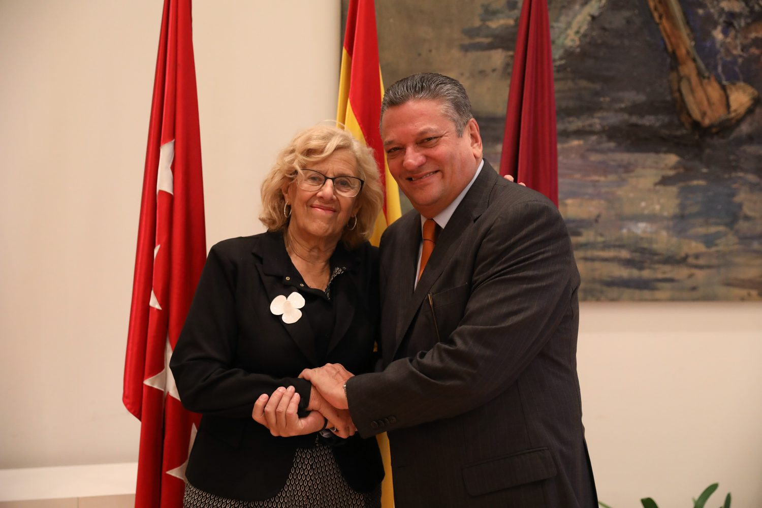 Manuela Carmena, alcaldesa de Madrid, ha mantenido un encuentro hoy, 17 de mayo, con su homólogo de San José de Costa Rica, Johnny Araya, que se encuentra de visita en Madrid. El alcalde de la capital costarricense fue elegido presidente de la Unión de Ciudades Capitales Iberoamericanas (UCCI) en la XVIII Asamblea General de esta organización municipalista celebrada el pasado abril en San José. Una presidencia que comparte con la alcaldesa madrileña.